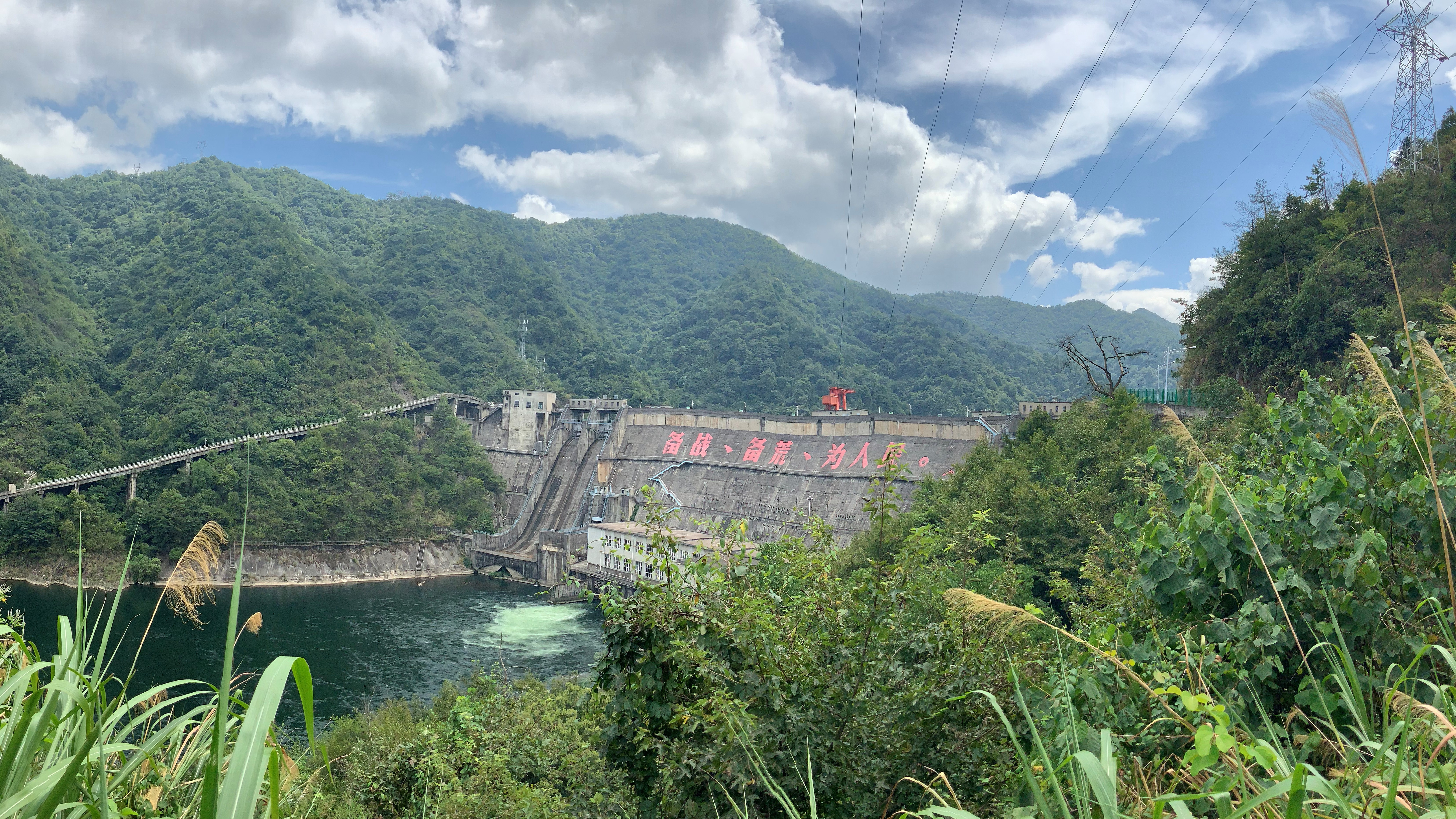 中文（中国大陆）: 陈村水库大坝